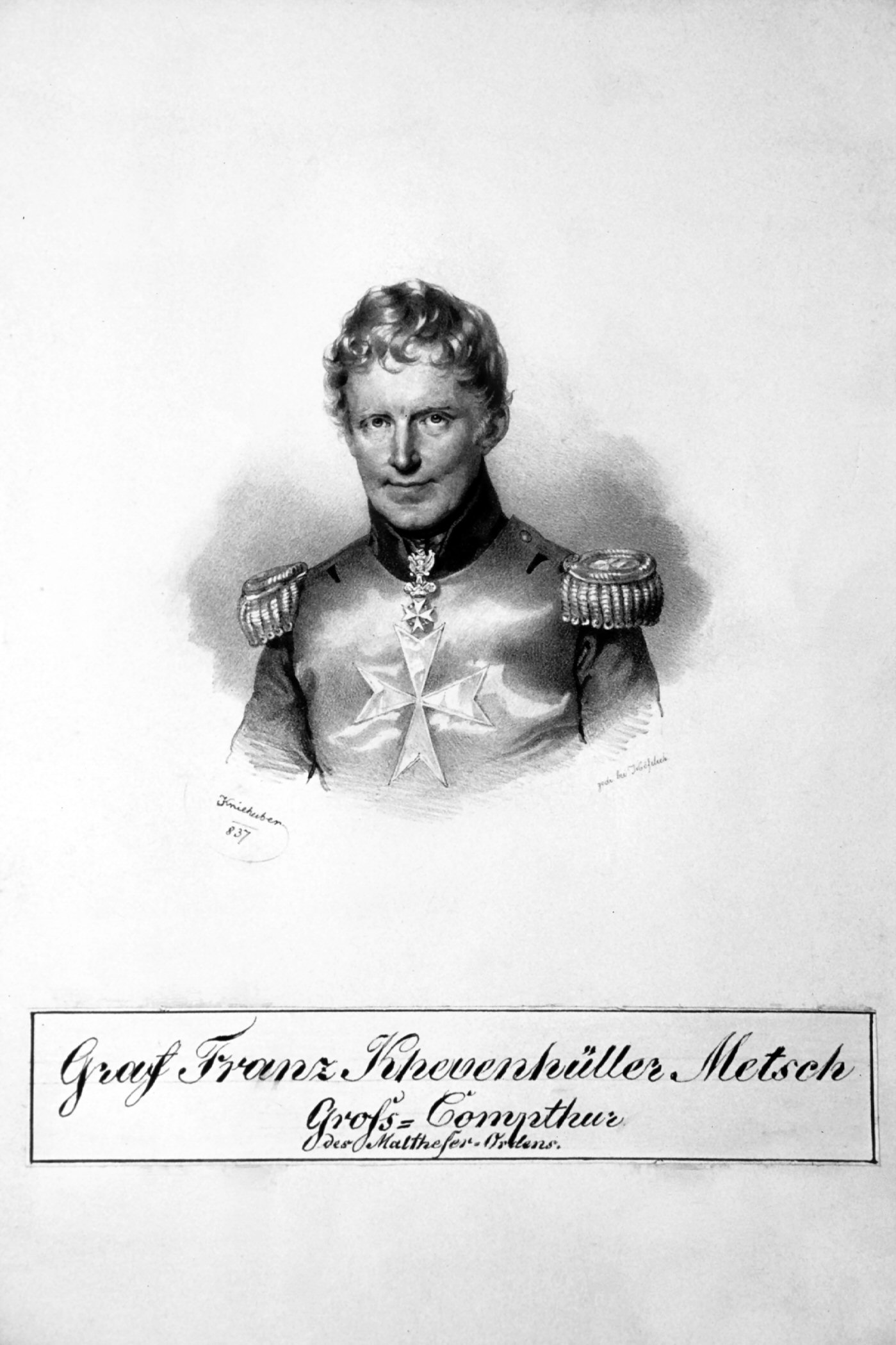 Franz Graf Khevenhüller-Metsch (1783-1867) k. k. Feldzeugmeister, Großkomtur des Malteserordens.